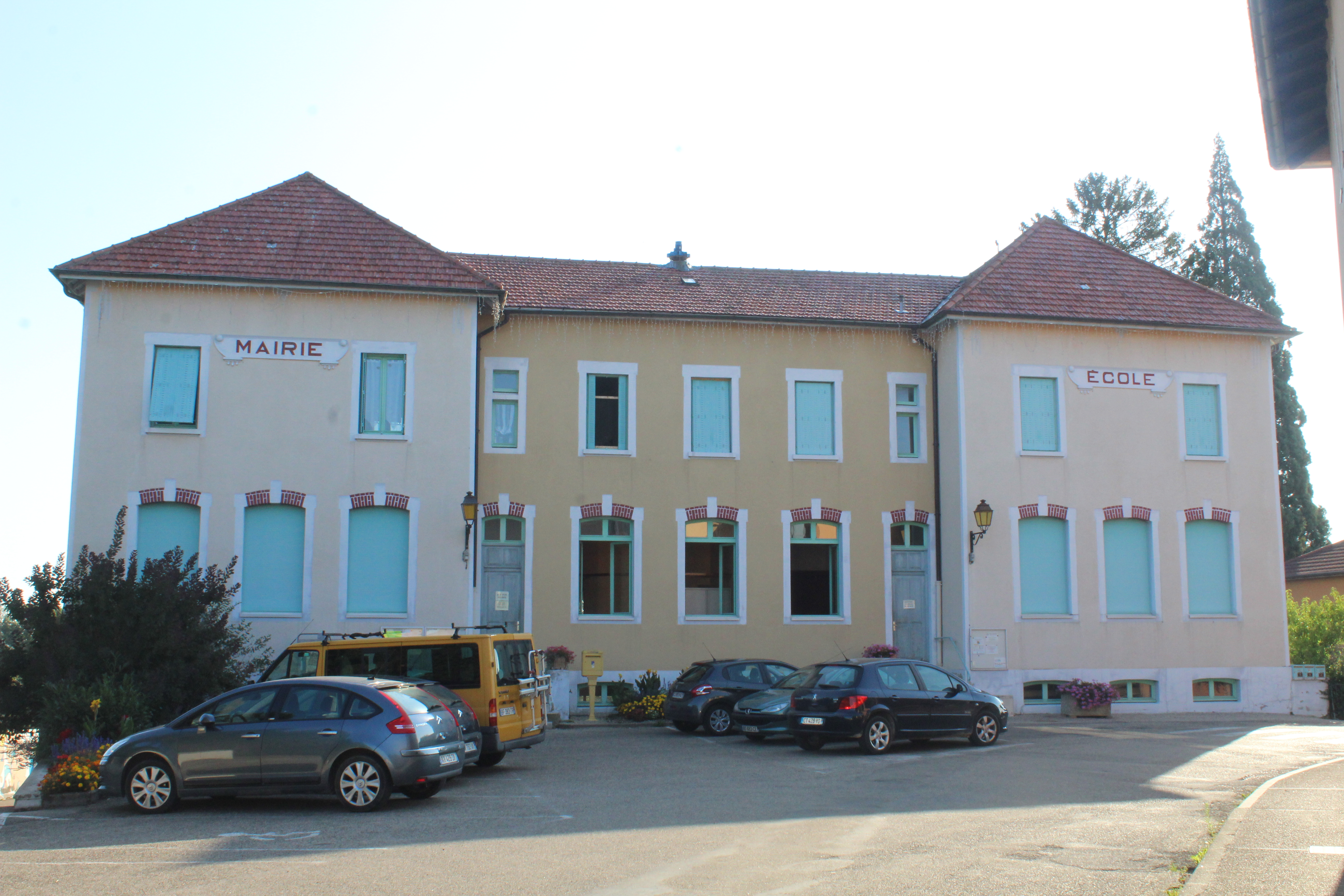 Mairie et école de Chaveyriat.